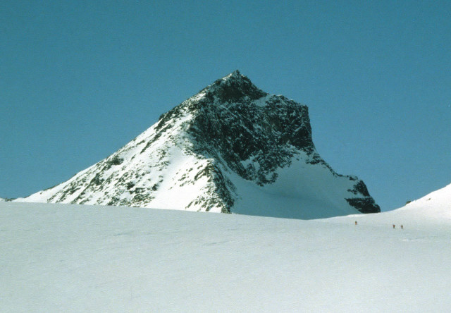 Midtre Hellstugutinden sett fra Hellstugubreen. Foto: Tore Røraas